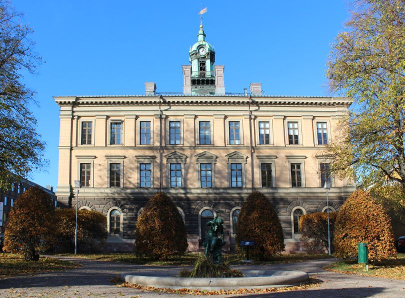 GÄVLE NORR 32:1 - husnr 1, GÄVLE RÅDHUS. Fotogr. från åsidan